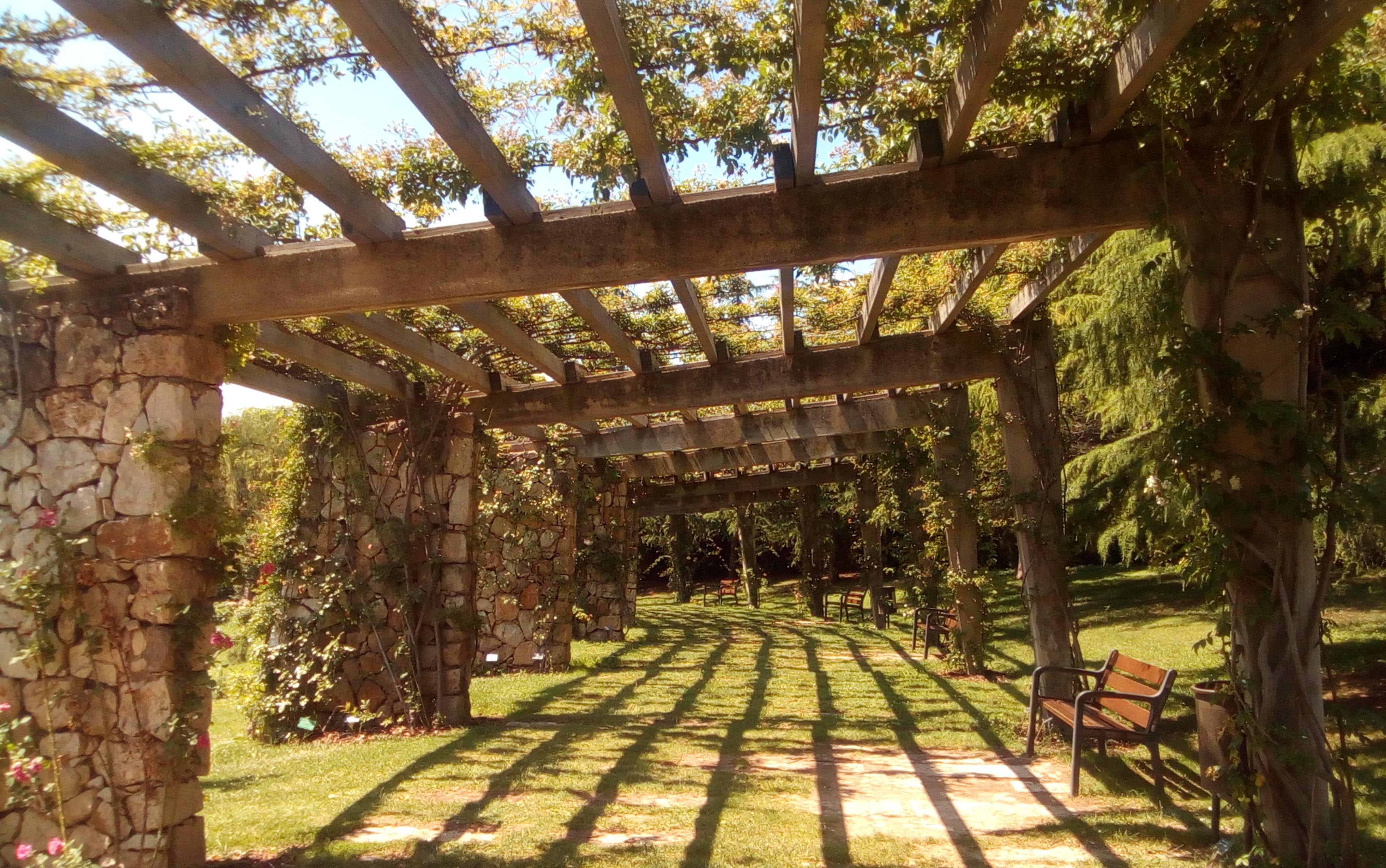 Pérgola del parque de Cervantes.